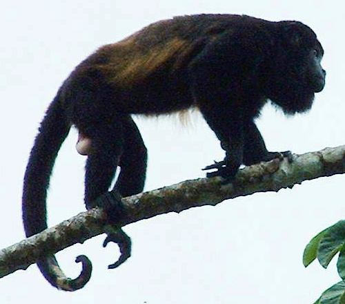 Mature male Mantled Howler (Alouatta palliata), Alajuela Province, Costa Rica